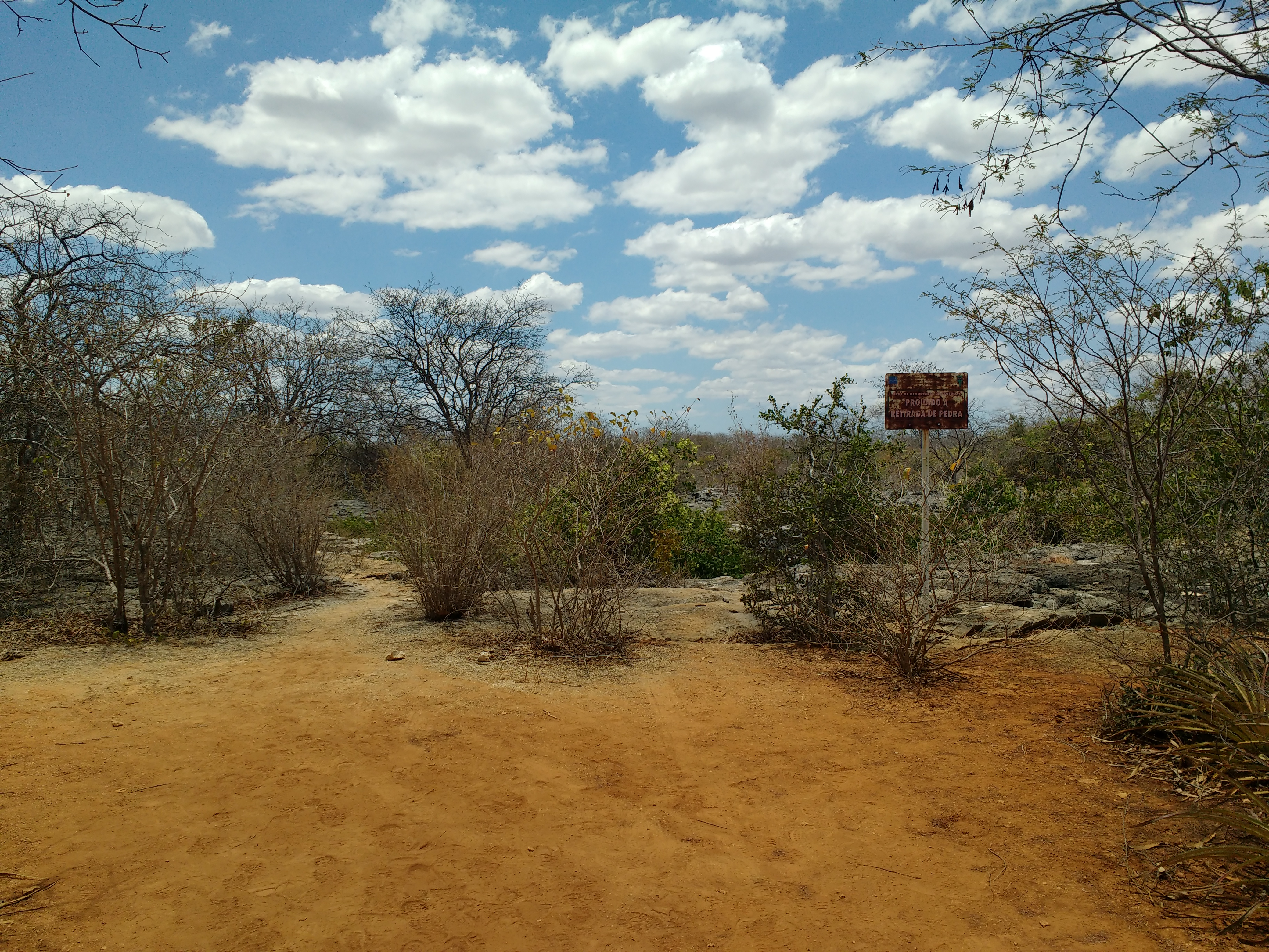 Parque Nacional da Furna Feia na zona rural de Baraúna, Rio Grande do Norte (Brasil)